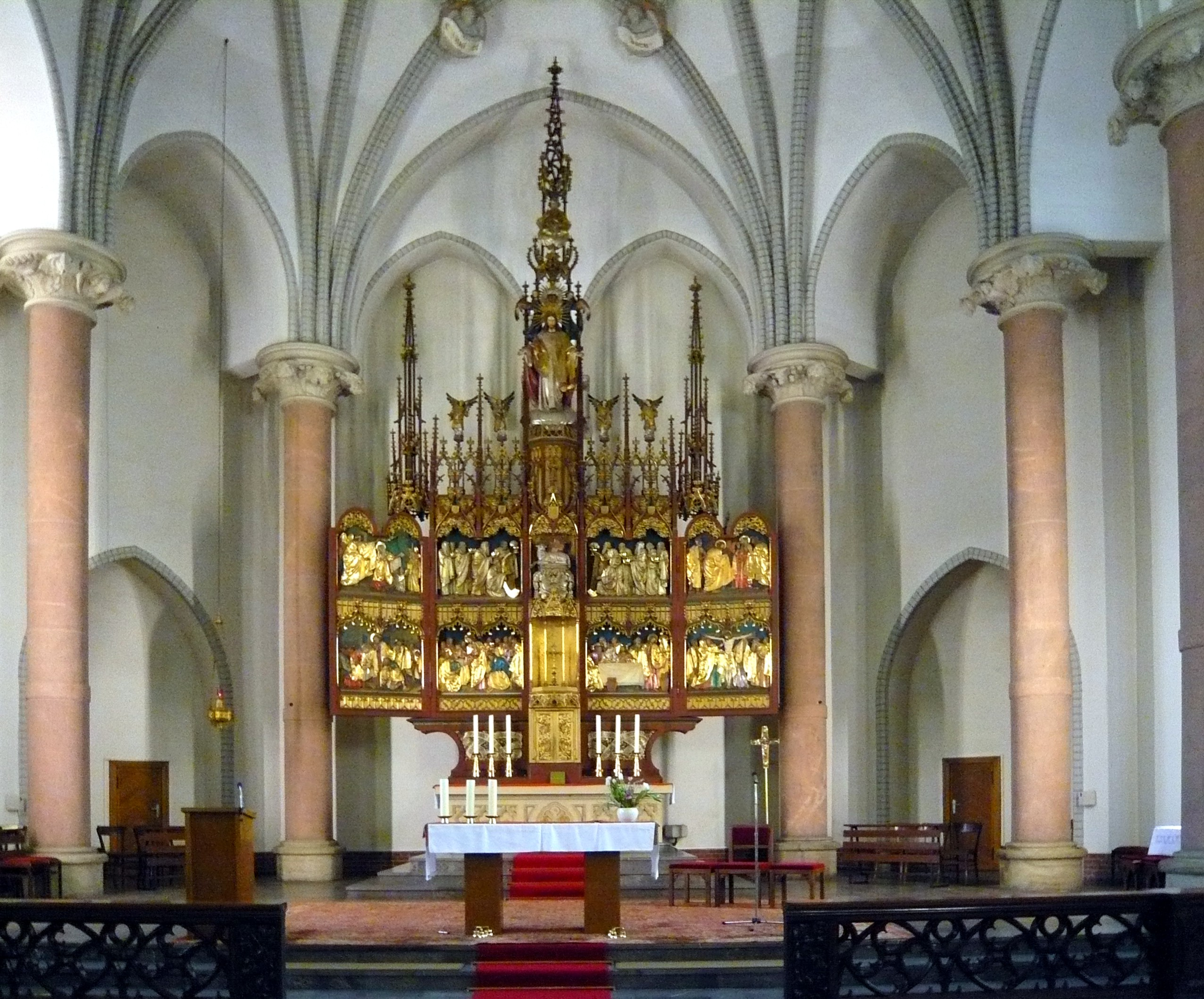 Kath. Kirche S. Corpus Christi, Prenzlauer Berg, Conrad-Blenkle-Straße